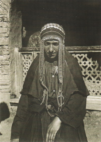 А.К. Сержпутовский. Женщина в национальном костюме. Дидойцы. 1910 г.